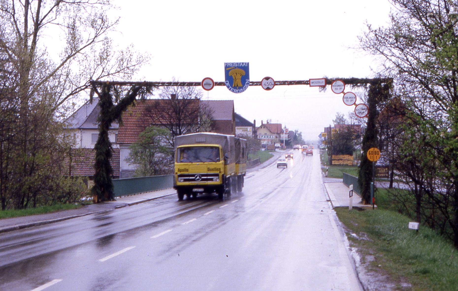 Die B 27 am Ortseingang von Ofterdingen. Mit 1. Mai-Scherz "Freistaat Ofterdingen".